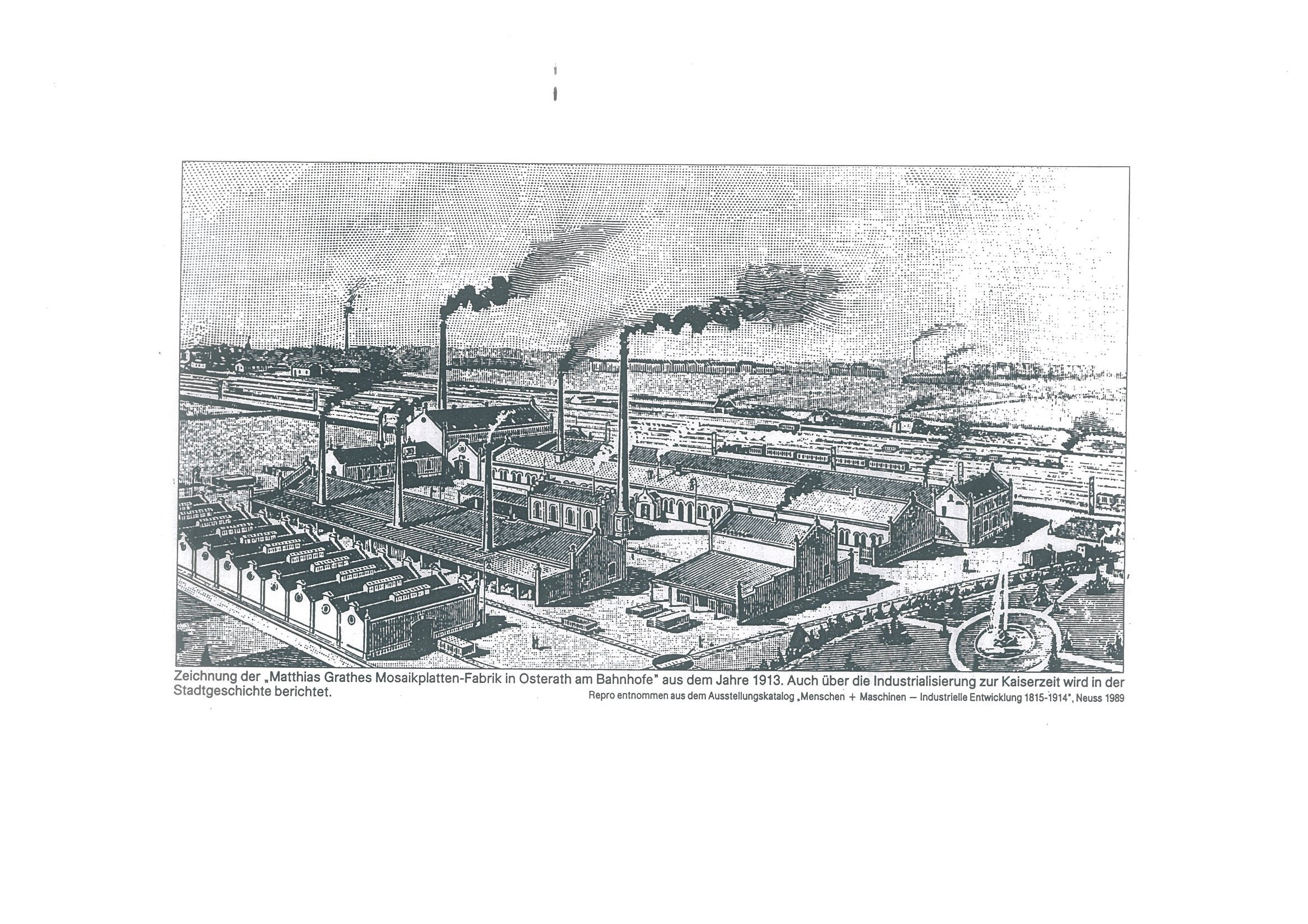 Selbst erstelltes Foto